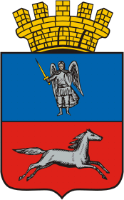 Герб Черкасc (1852)